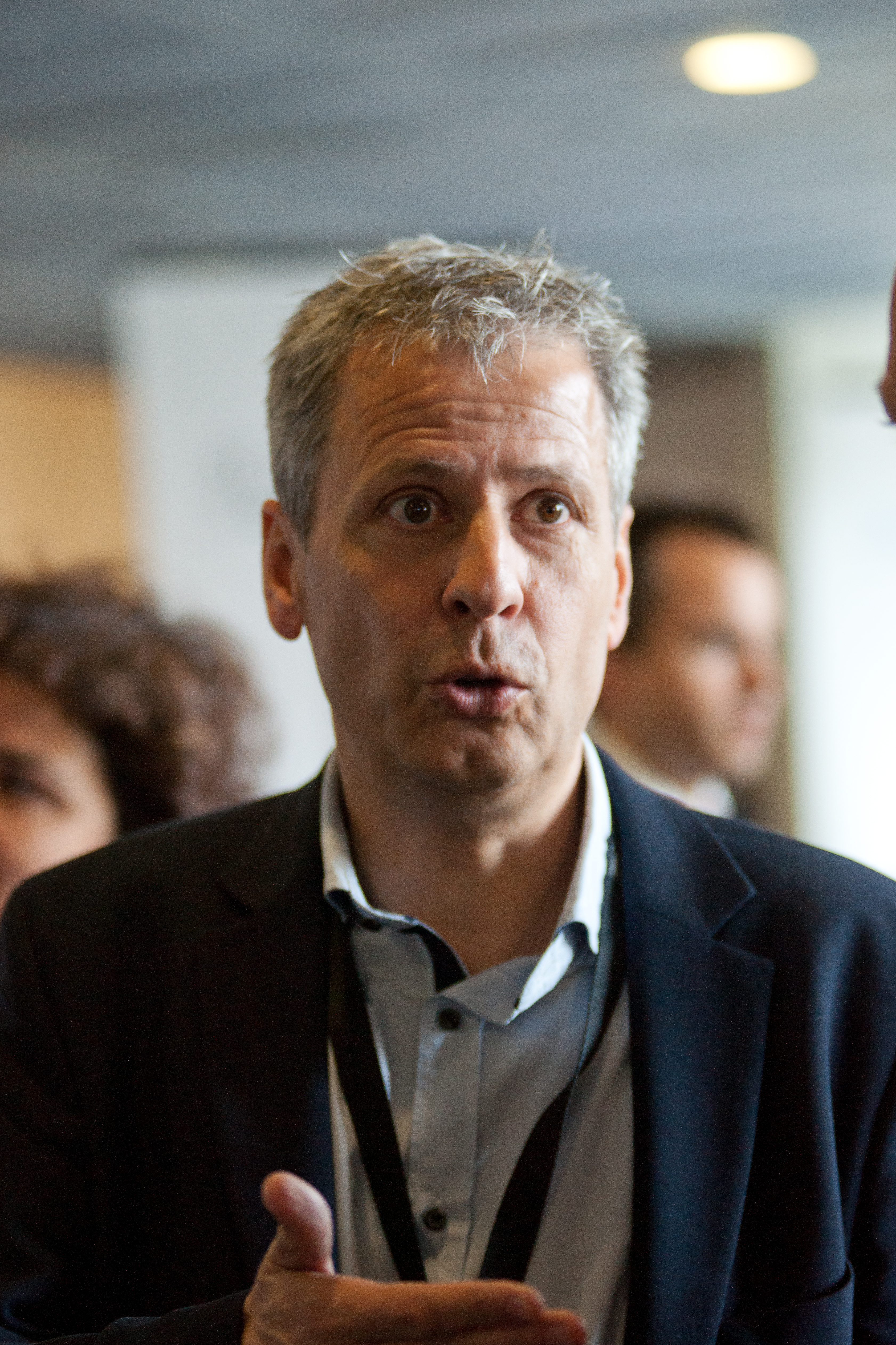 Lucien Favre lors du Forum des 100 en 2012.